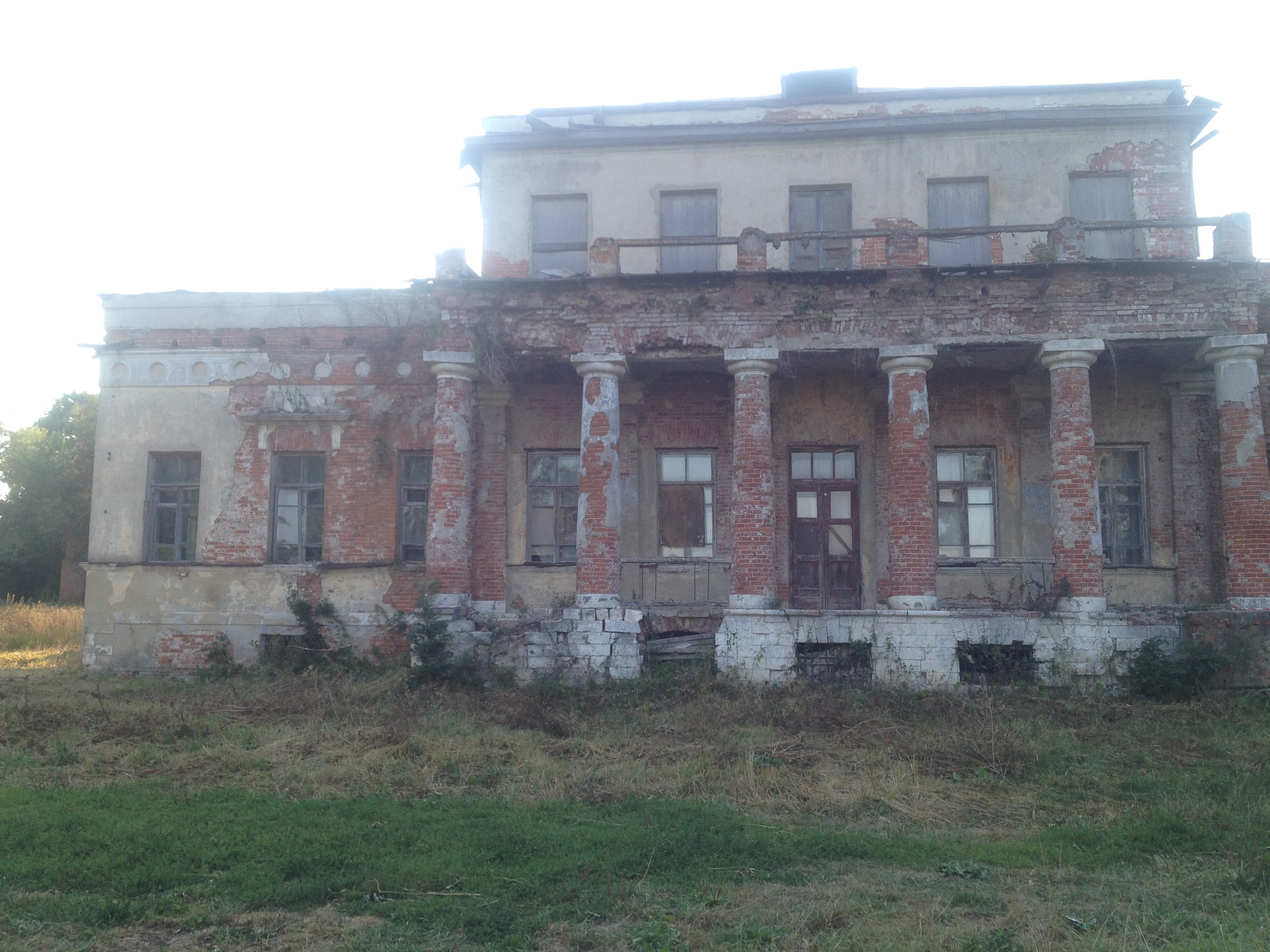 Усадьба Мирковича А. Я. (Тульская область, Суворов, село Николо-Жупань)